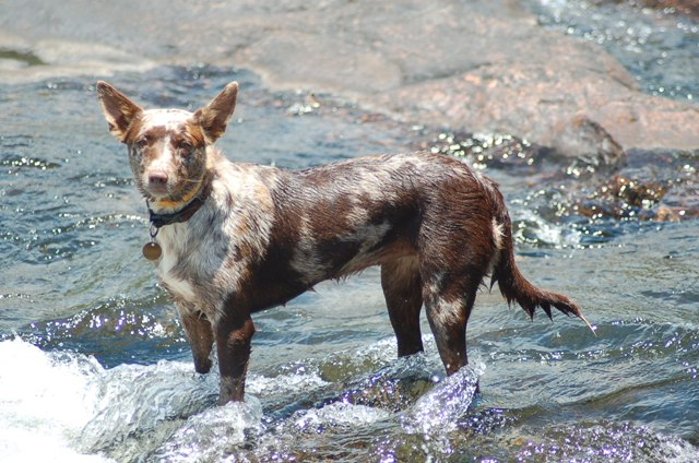 Koolie-red merle- In water